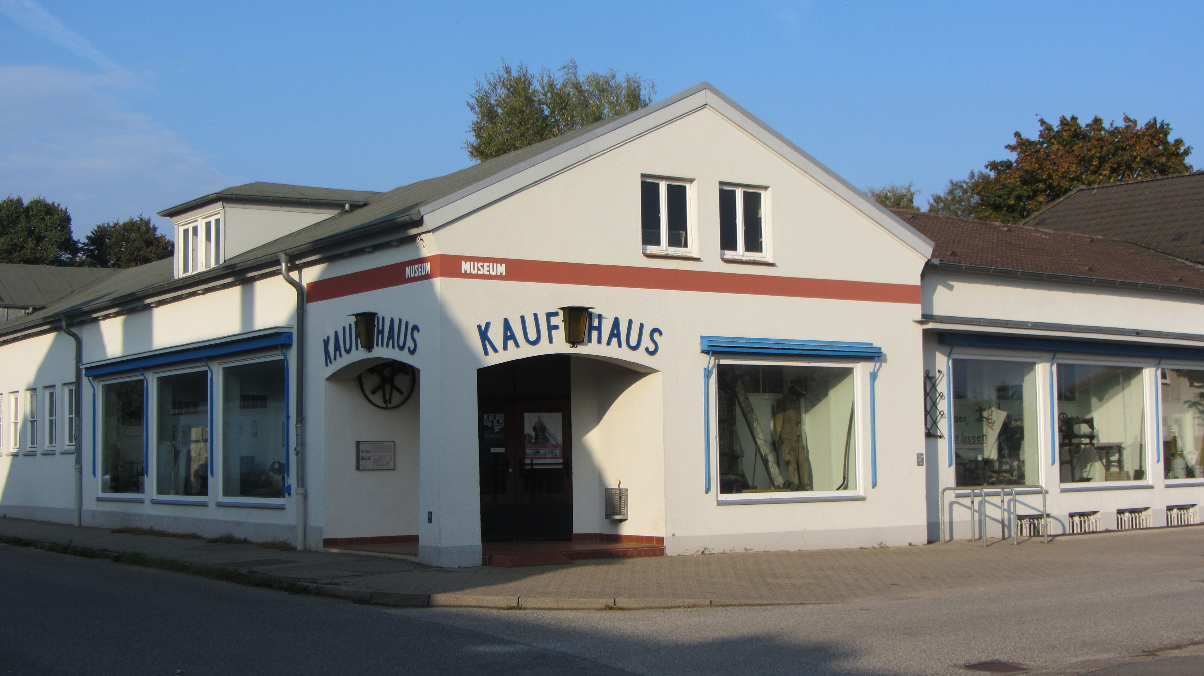 Industriemuseum Geschichtswerkstatt Herrenwyk in Lübeck Kücknitz. ehemaliges Kaufhaus